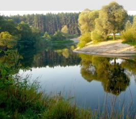 Красивейшее место Суджанского р-на р.Псёл (коса). Фото во время отдыха 20.07.2009 г